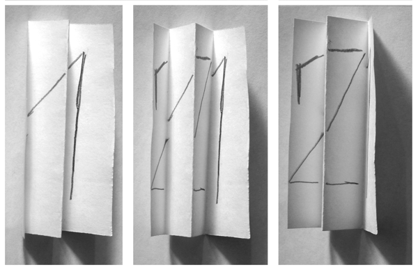 Простейшая стереограмма из двух ракурсов. При правильном расположении глаз каждый видит свой ракурс.